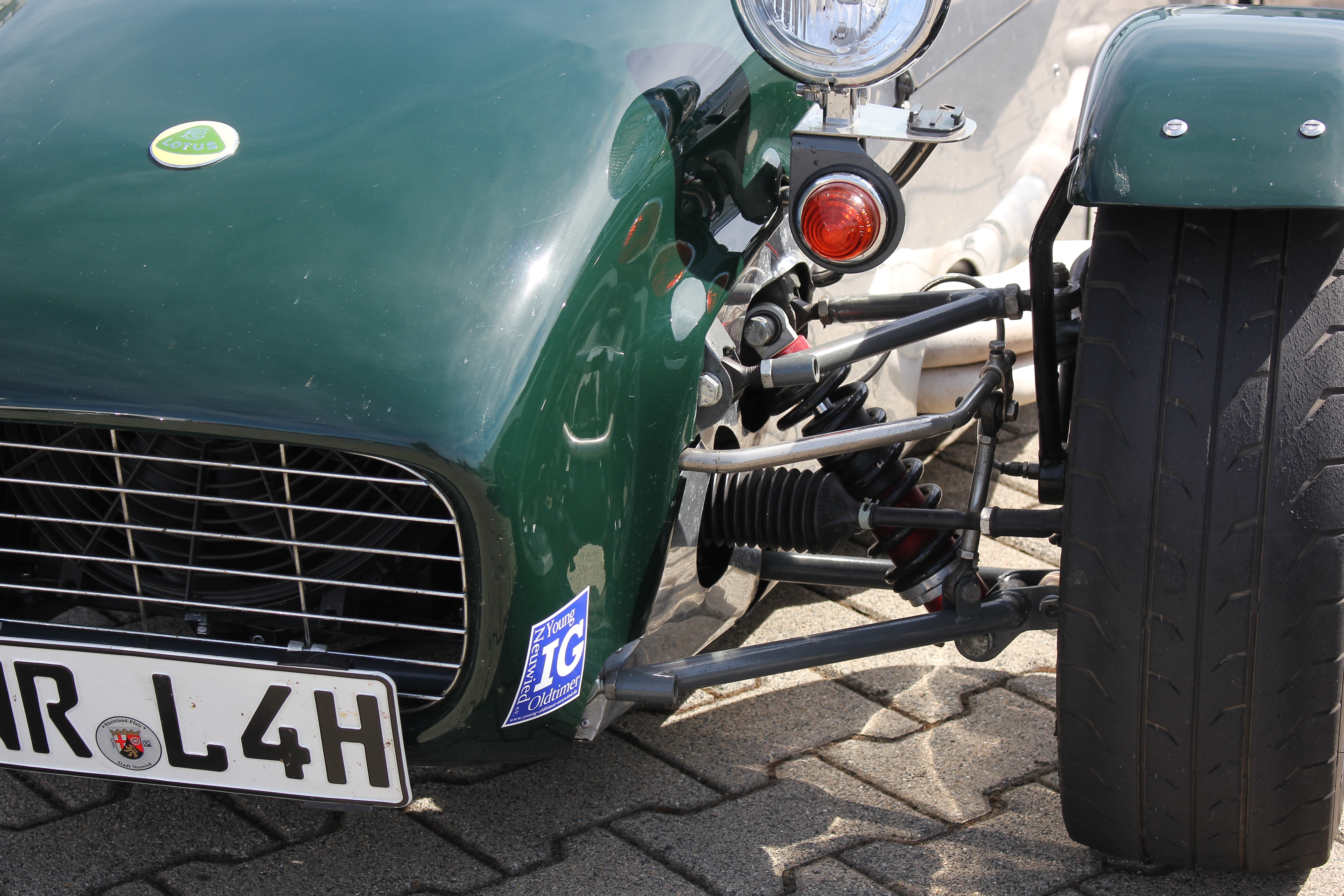 Vorderradaufhängung eines Lotus Seven 3 S von 1969